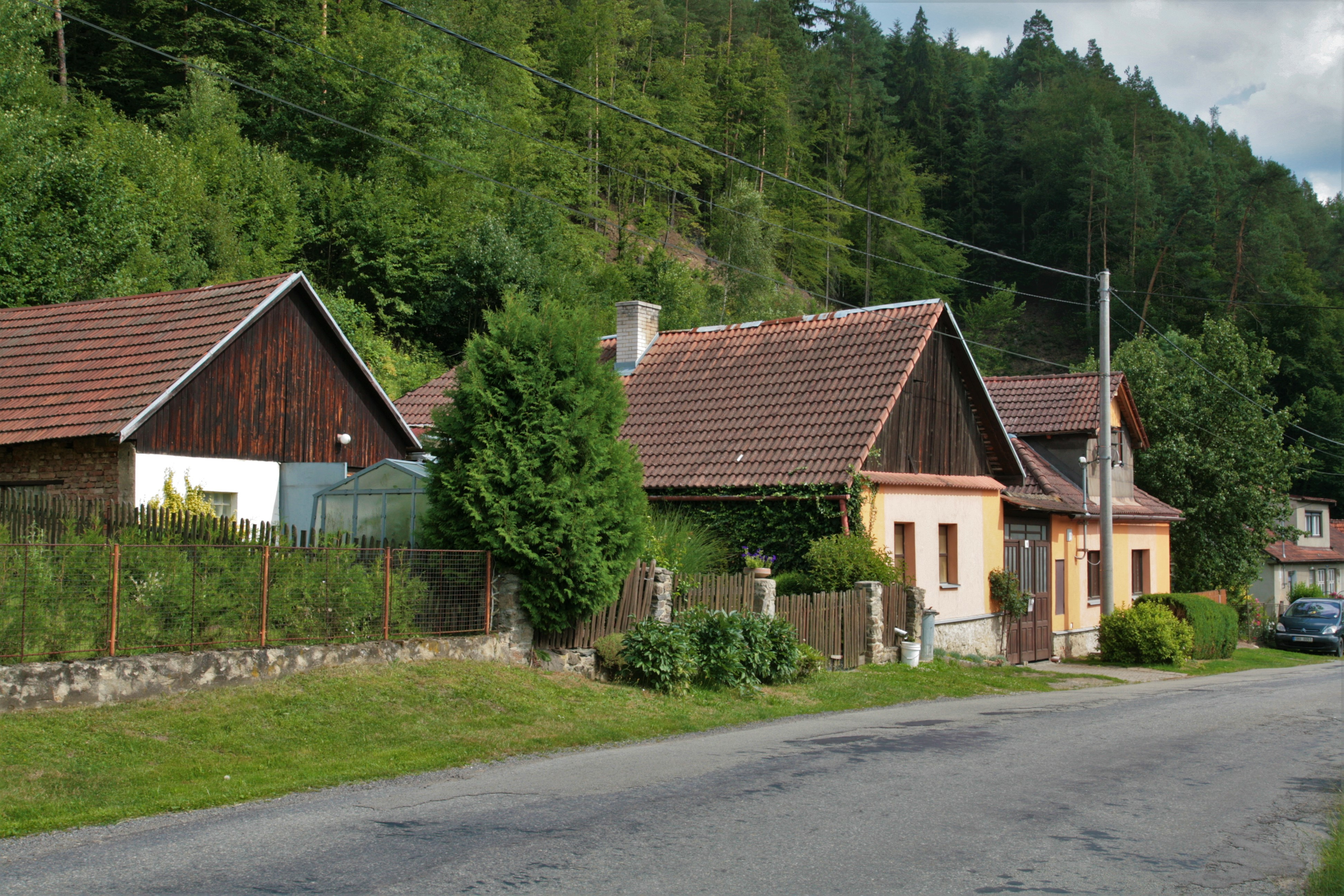 Vesnice Dolní Smržov, část města Letovice v okrese Blansko. Dům čp. 18 u silnice.